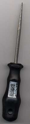 priem; eigen foto